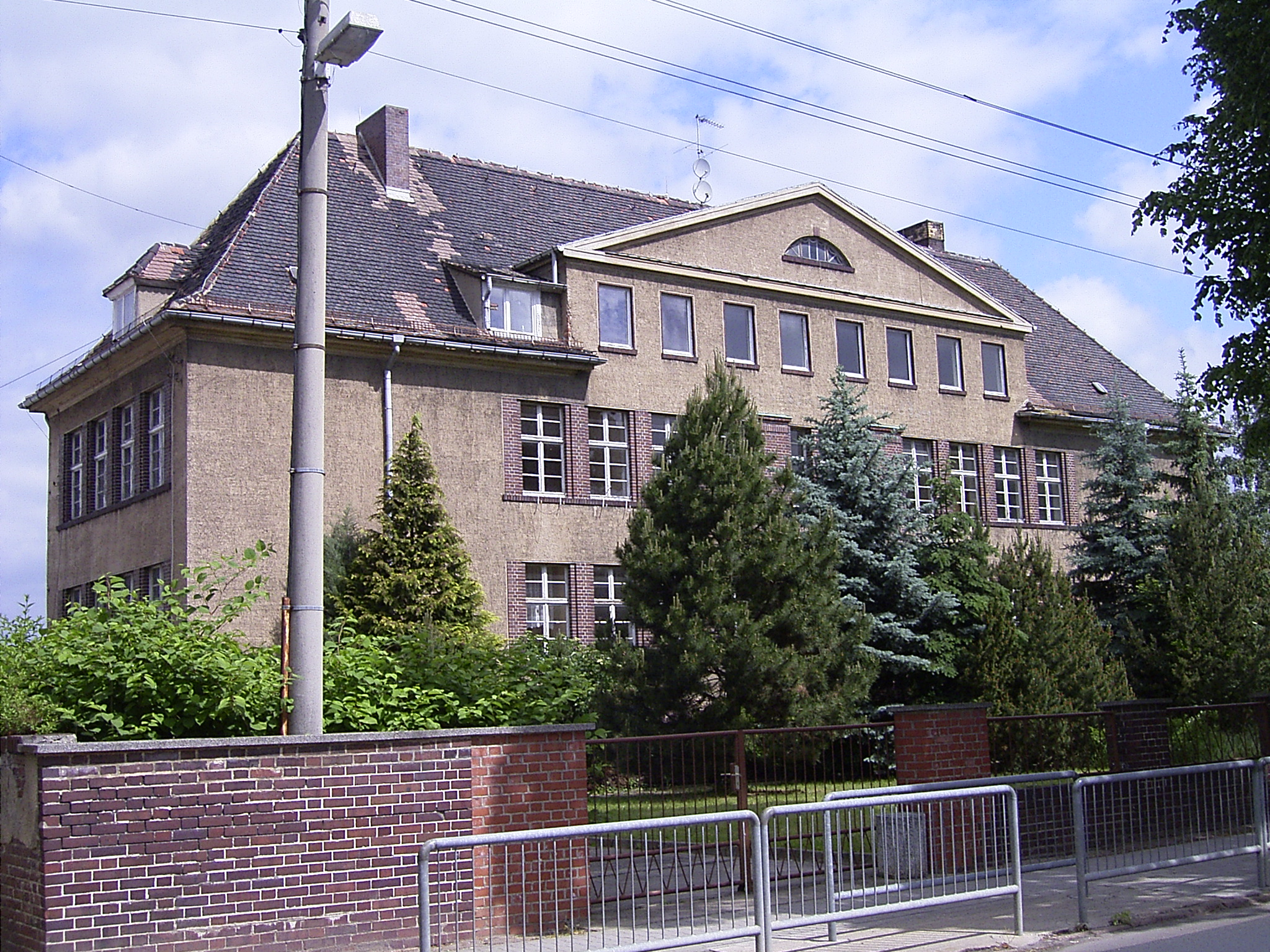 Schule Radegast Anhalt